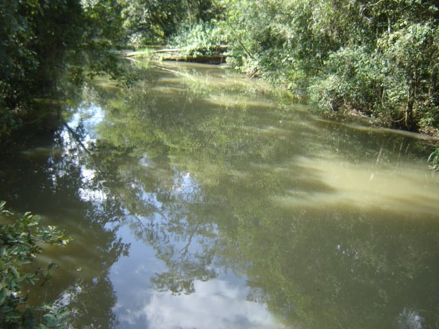 Rio Claro de Rio Claro-SP